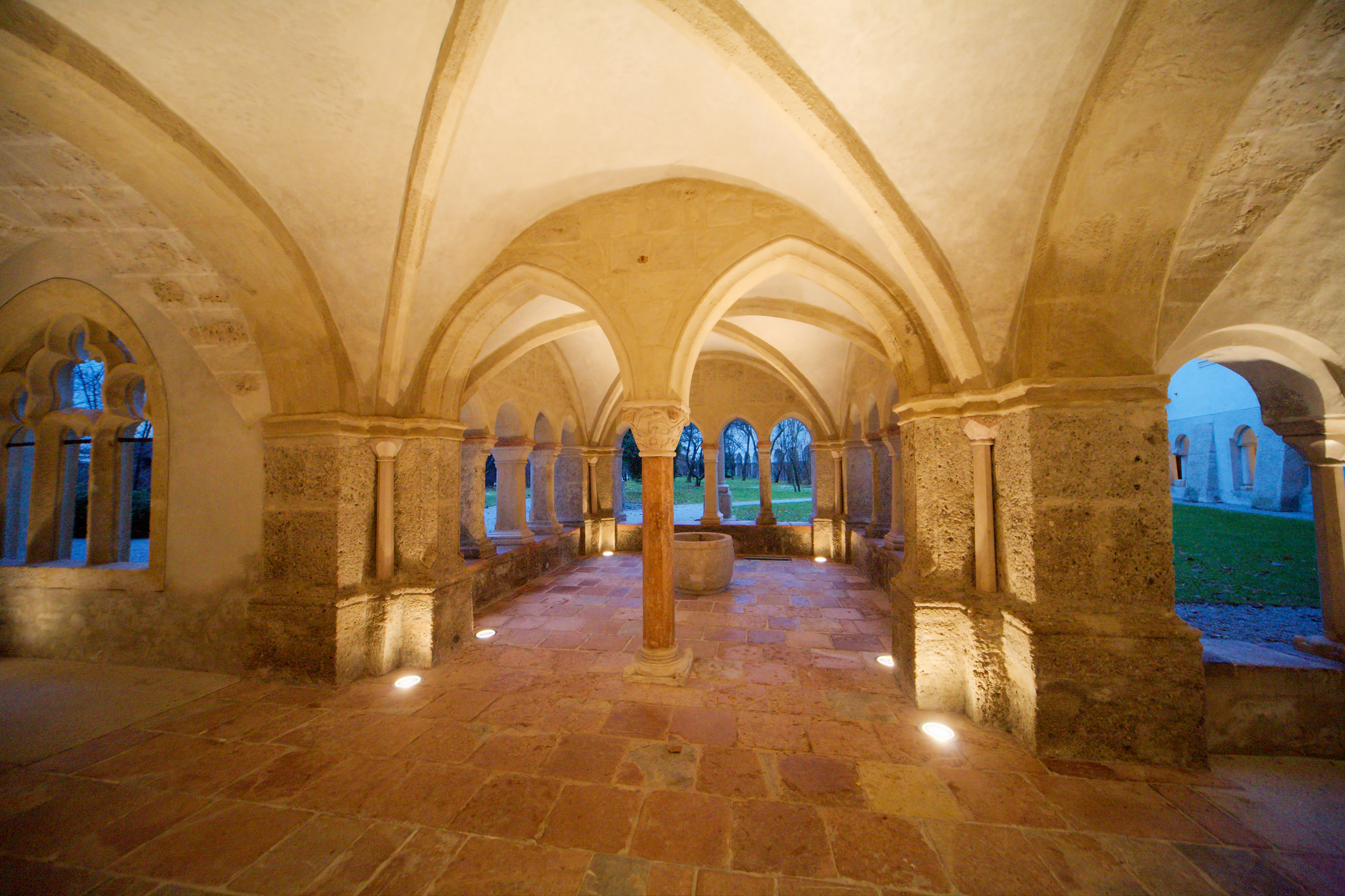 Stift St.Peter, Kreuzgang, Brunnen unter Pauluskapelle